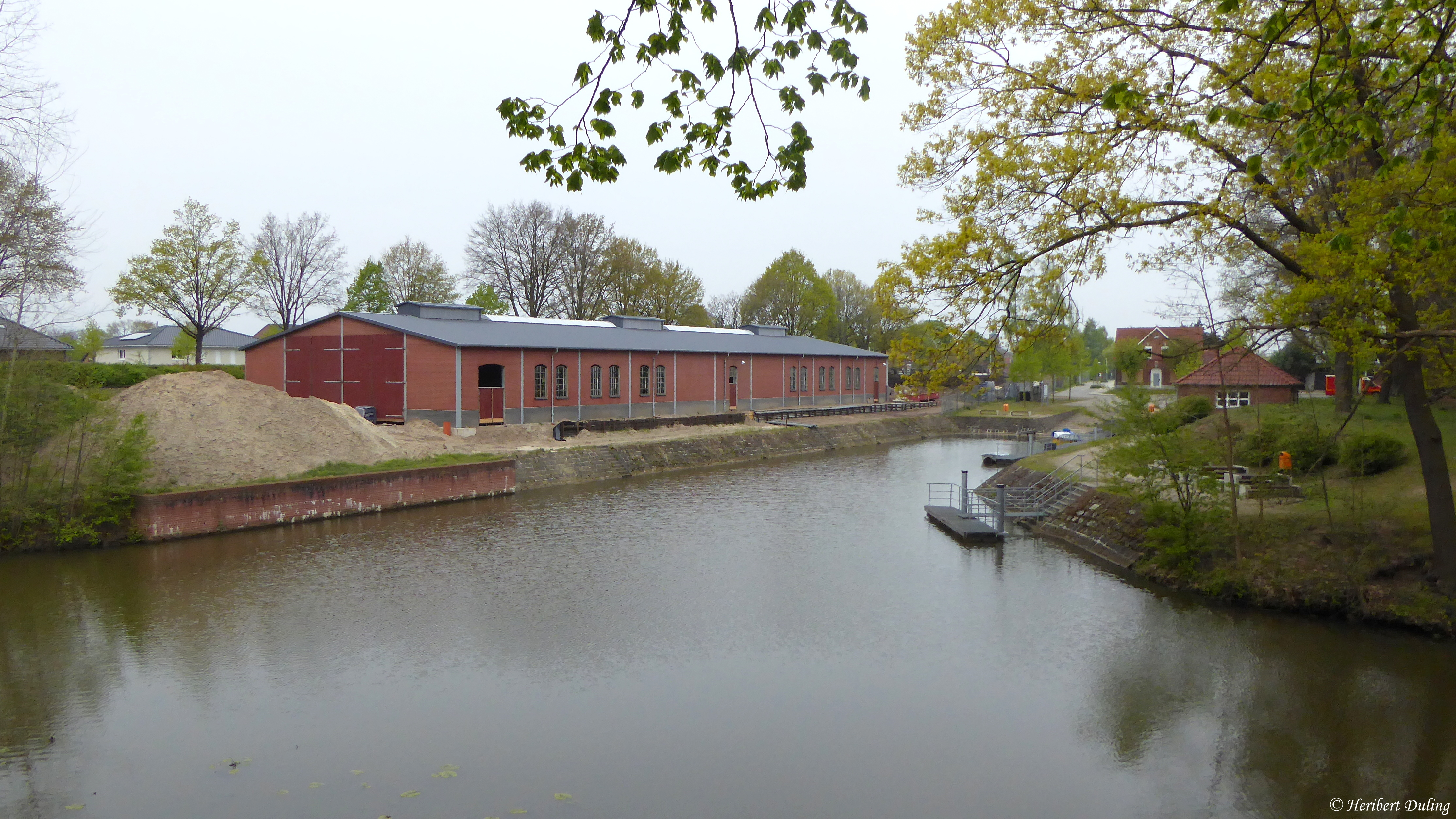 Klukkerthafen